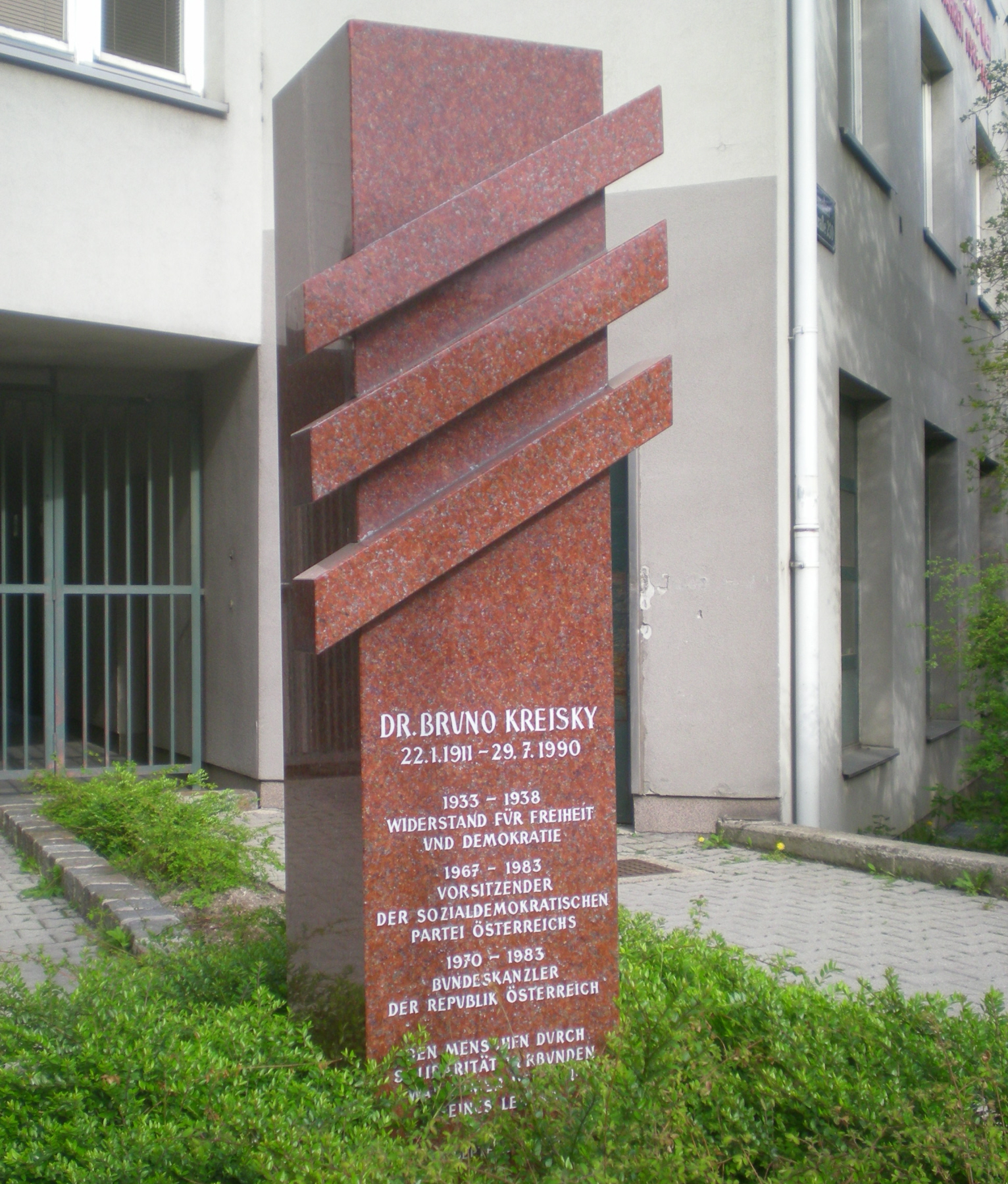 Bruno-Kreisky-Denkmal in der Hernalser Hauptstraße in Wien-Hernals